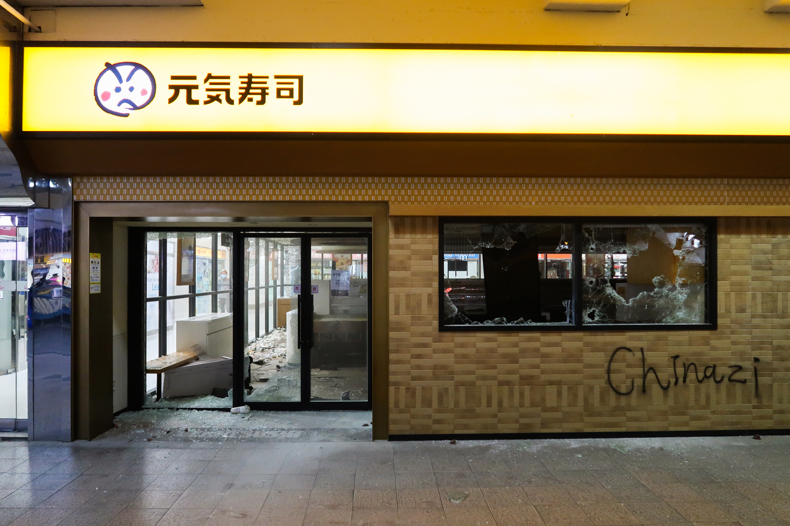 Genki Sushi Lucky Plaza branch damage